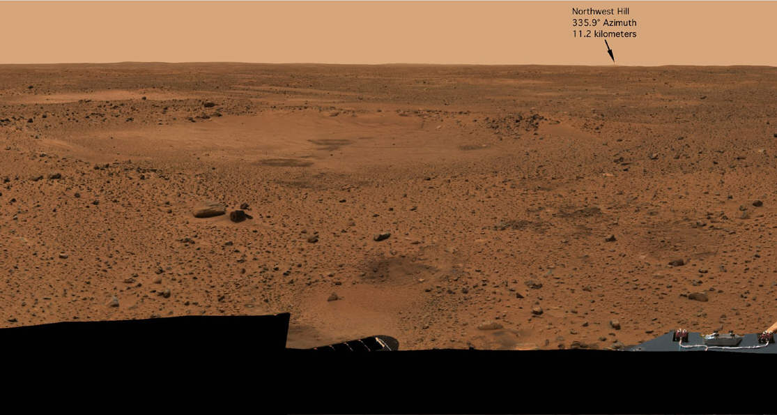 Gusev-Krater Mars, Sleepy Hollow, Landestelle Spirit (MER-A)